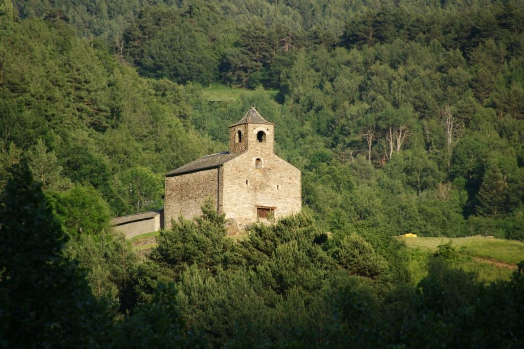 Església de Sant Cristòfol d'Anyós